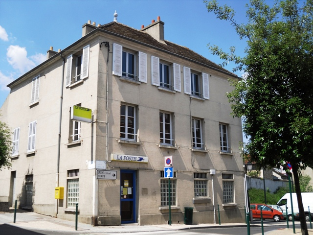 Agence postale centrale d'Igny (91)